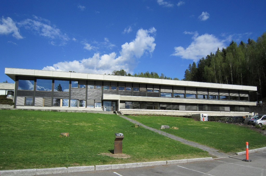 Hovedbygningen på Maihaugen